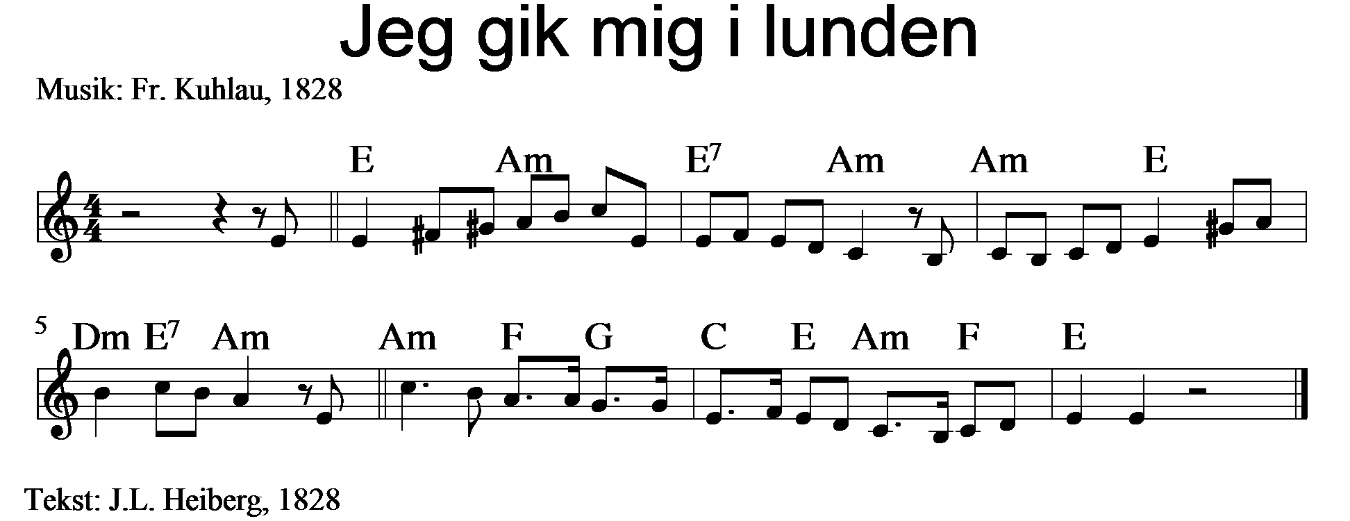 Jeg gik mig i lunden.